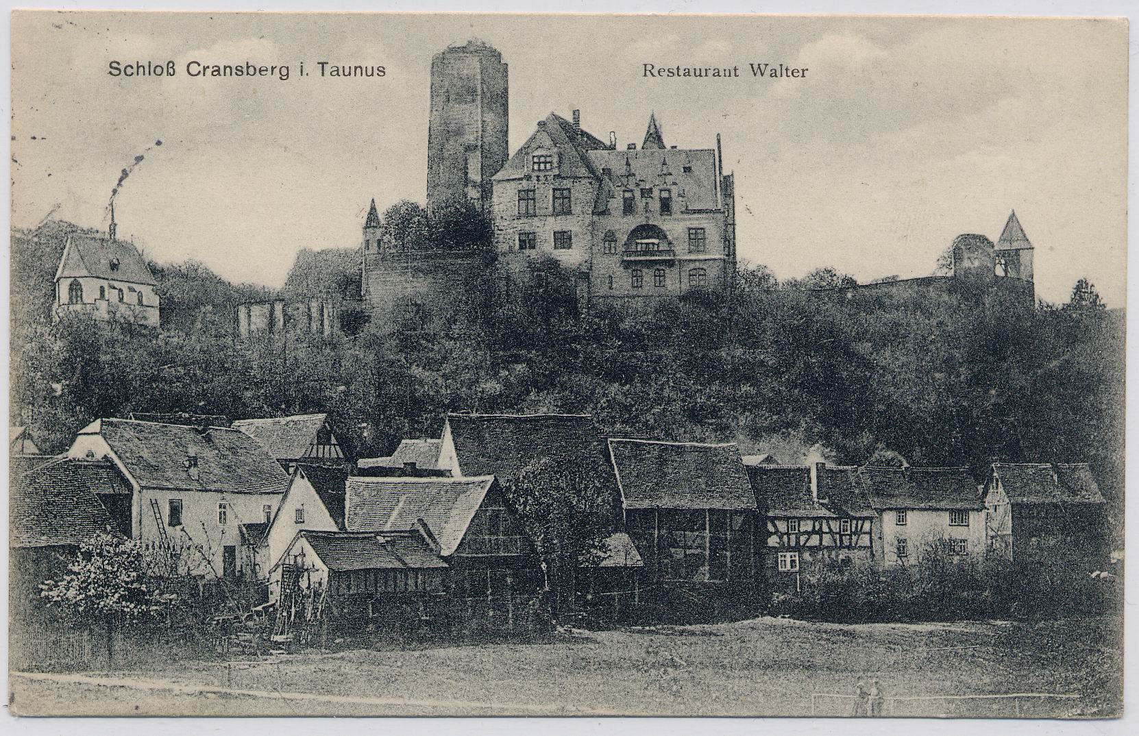 Schloss Kransber Historic Front